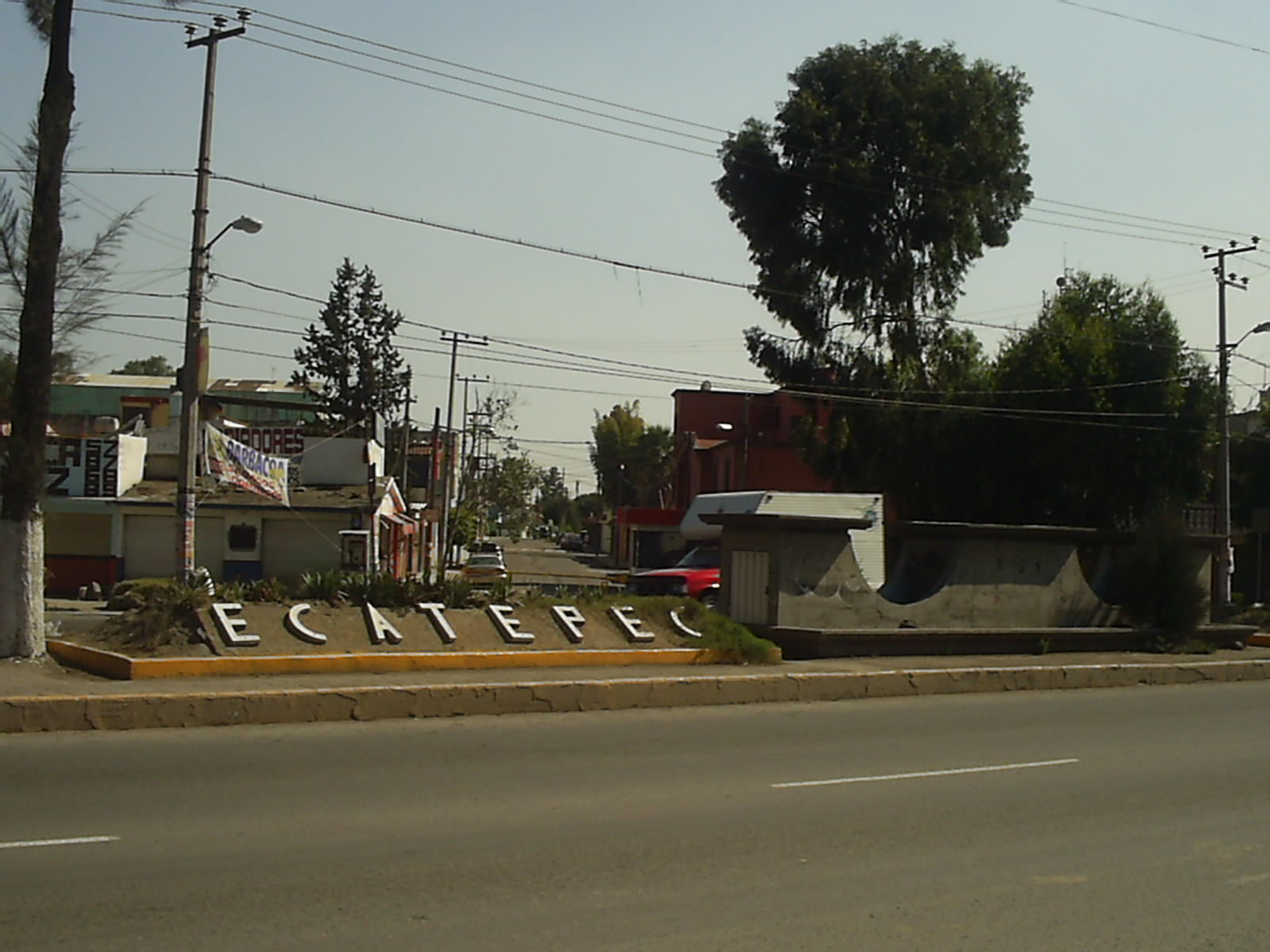 Vía Morelos Ecatepec México